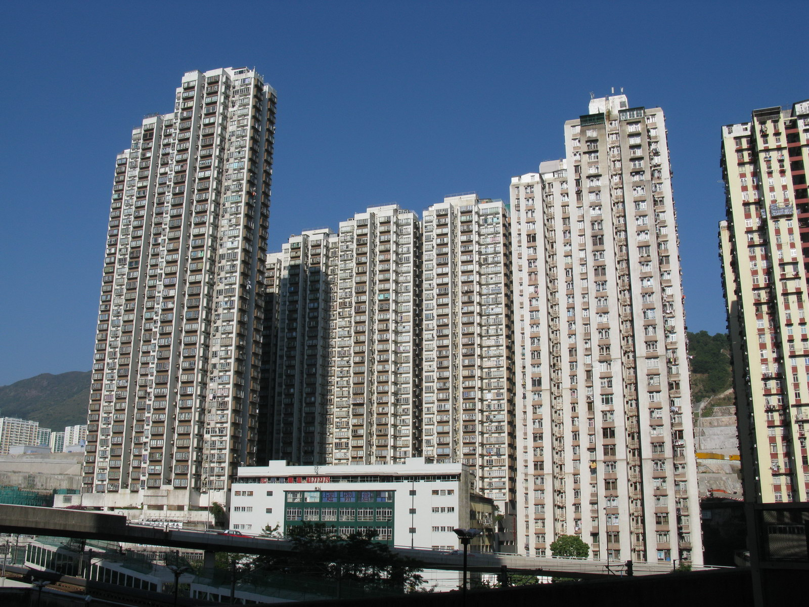 得寶花園 Tak Bo Garden